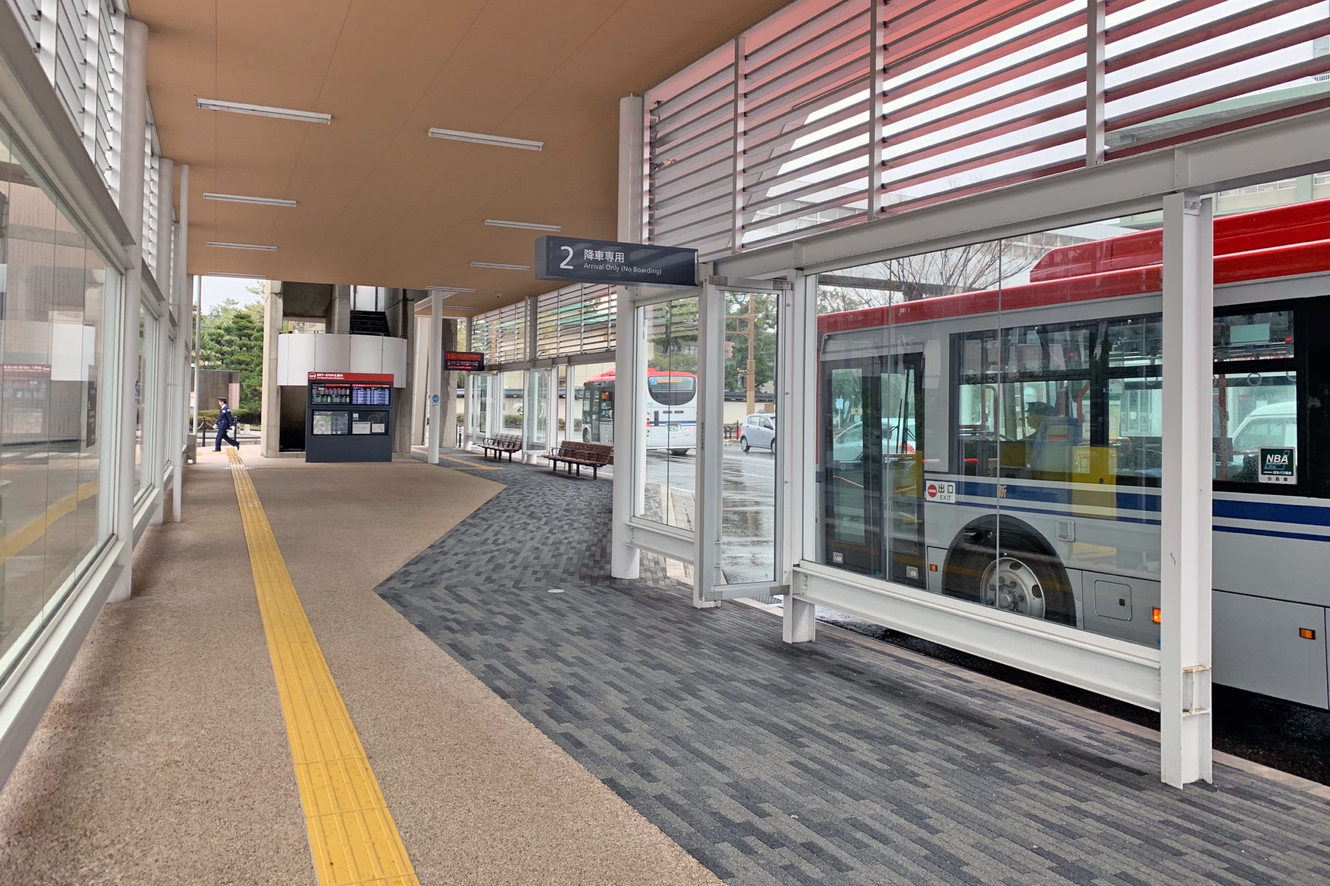 萬代橋ライン市役所前乗り換え拠点（2019年3月）